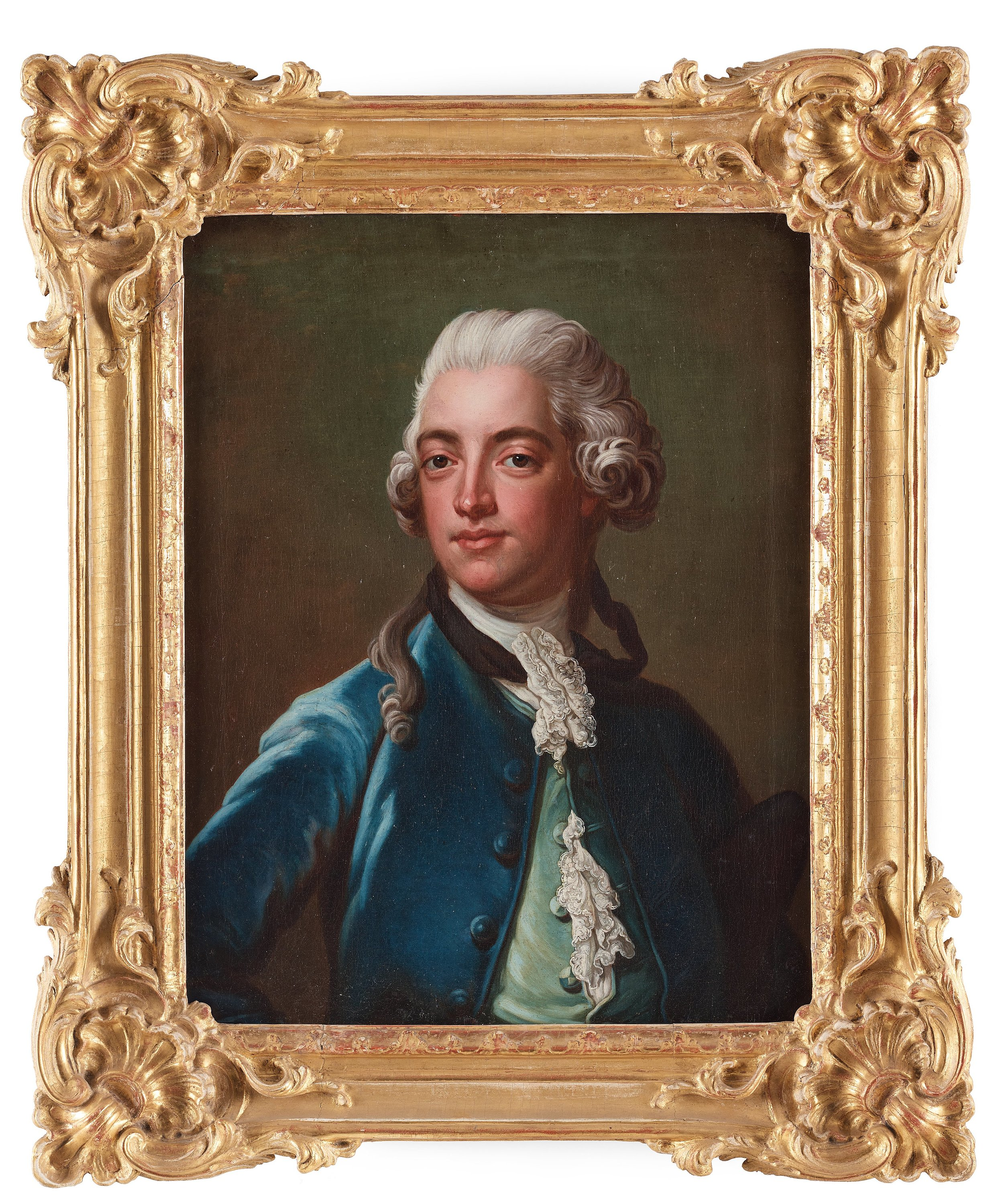 Jean Frederic Bedoire (1747-1830) avporträtterad av Jakob Björck. Troligen från 1770-talet.